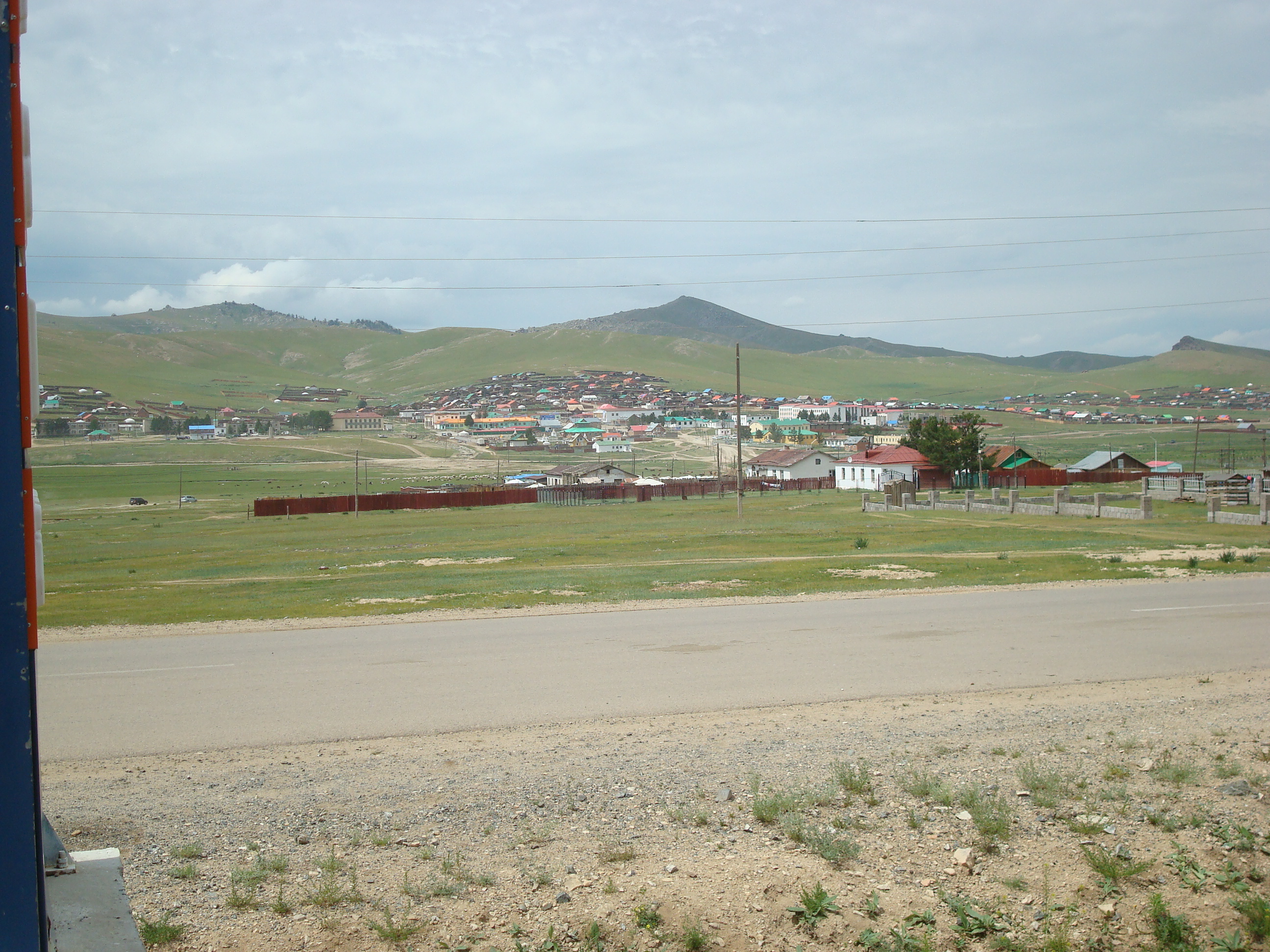 Khujirt